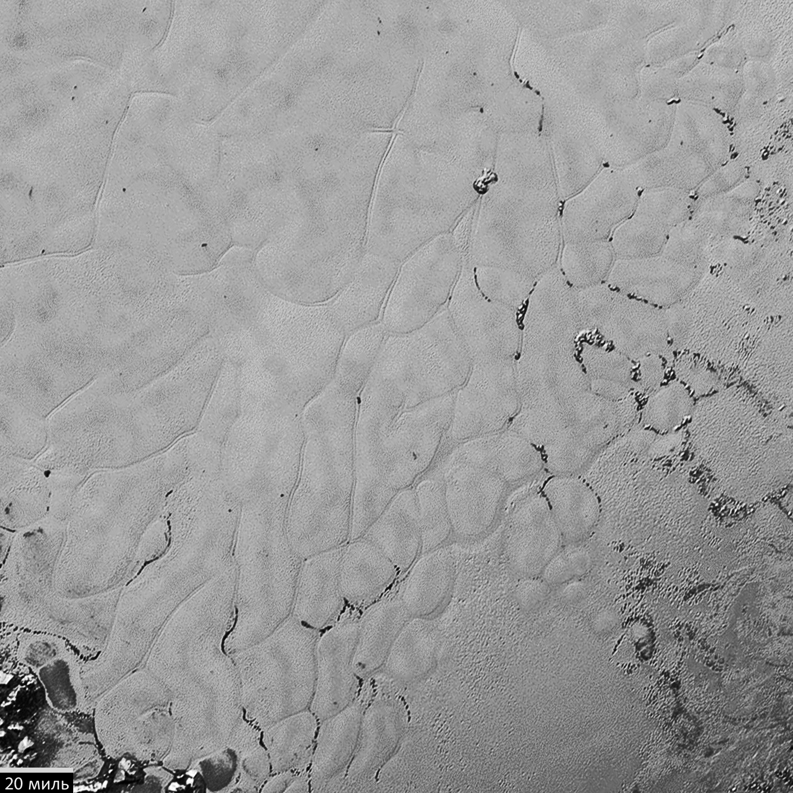 Изображение равнины Спутник в высоком разрешении.